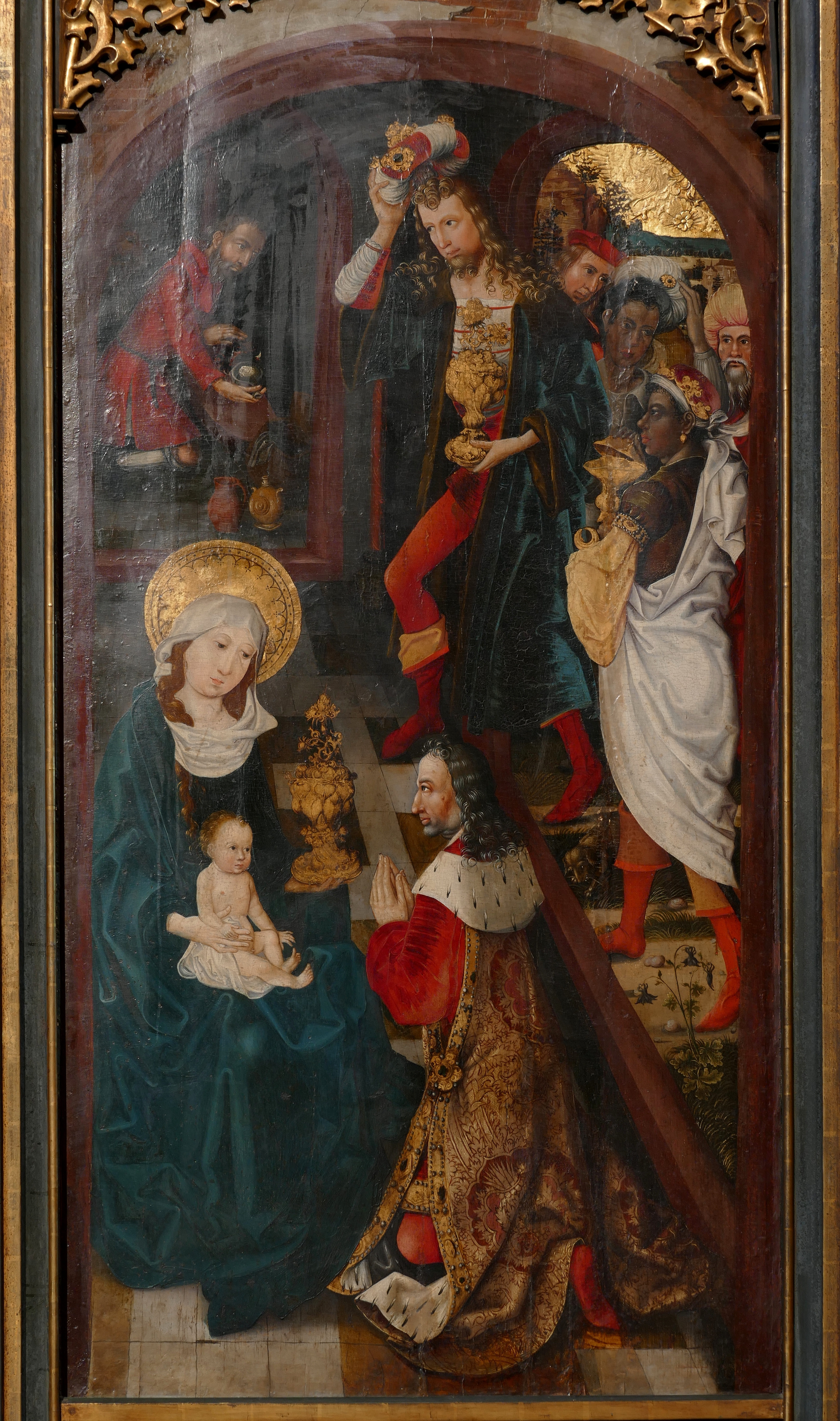 Alsace, Bas-Rhin, Église Saint-Georges de Haguenau (PA00084724, IA00061901). Retable "Jugement dernier" (Veit WAGNER, 1496): Panneau peint "Nativité, Adoration des Mages" (Martin DIEBOLD ou Martin HANS, 1496). This object is classé Monument Historique in the base Palissy, database of the French furniture patrimony of the French ministry of culture, under the references PM67000542 and IM67002088.